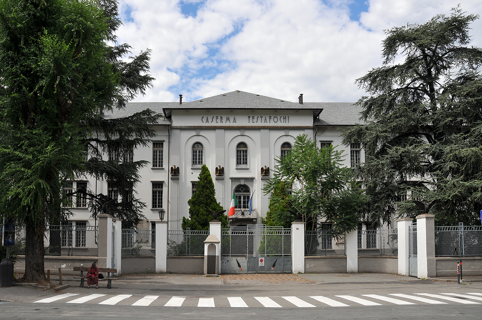 Caserma Testafochi - Piazza della Repubblica - Aosta